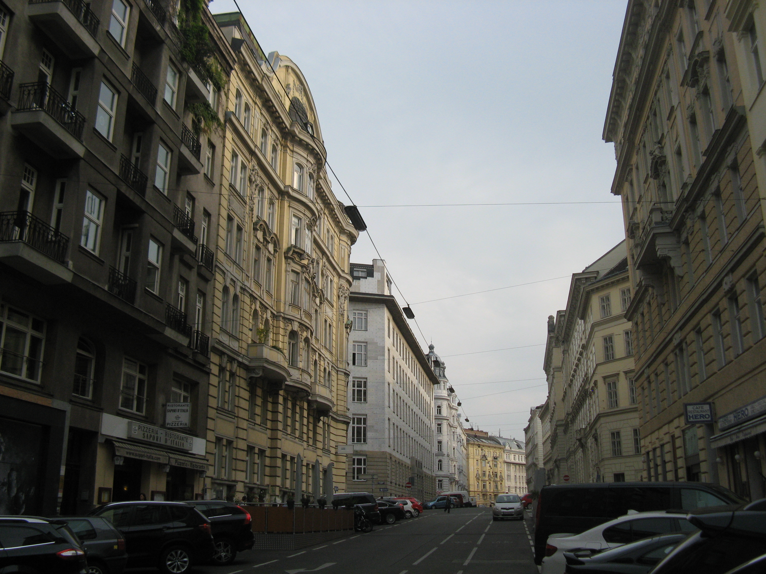 Dominikanerbastei, Wien-Innere Stadt